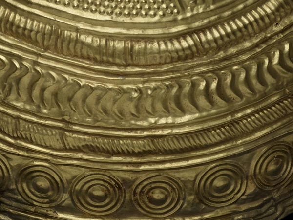 Cuenco de Axtroki (Bronce Final). Número de inventario: 1973-77-1.